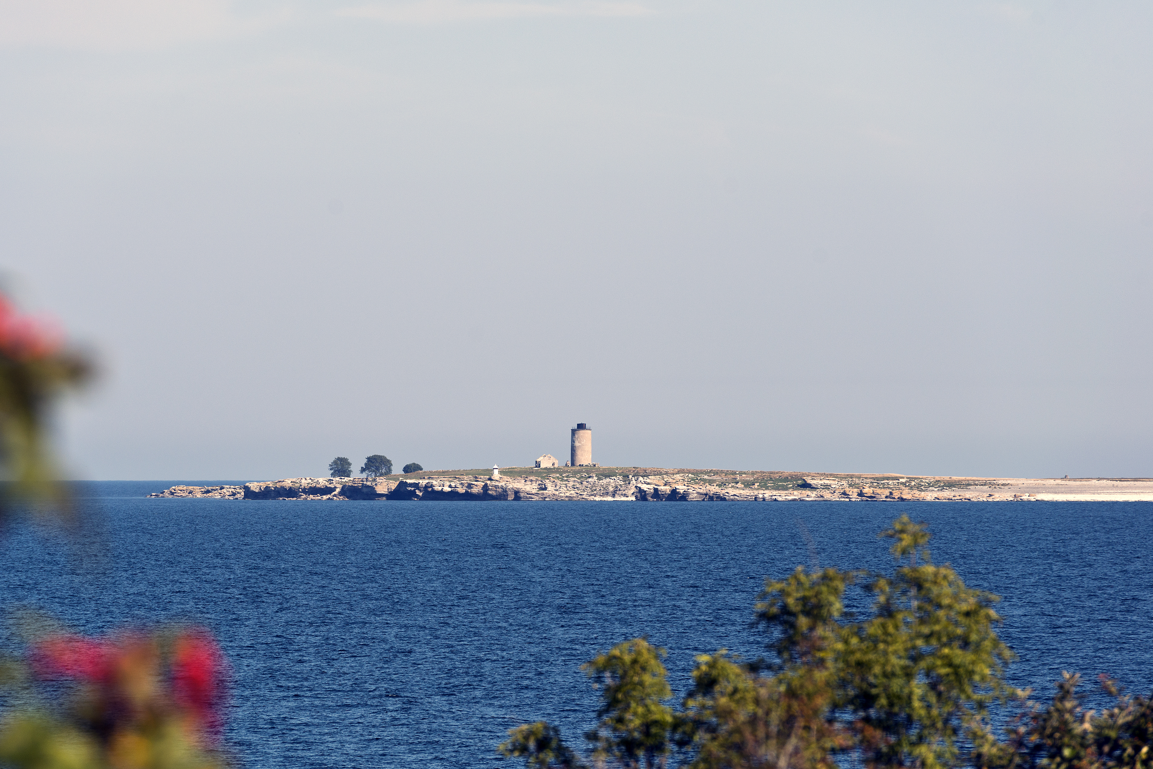 Iron Age fort and an old lighthouse.